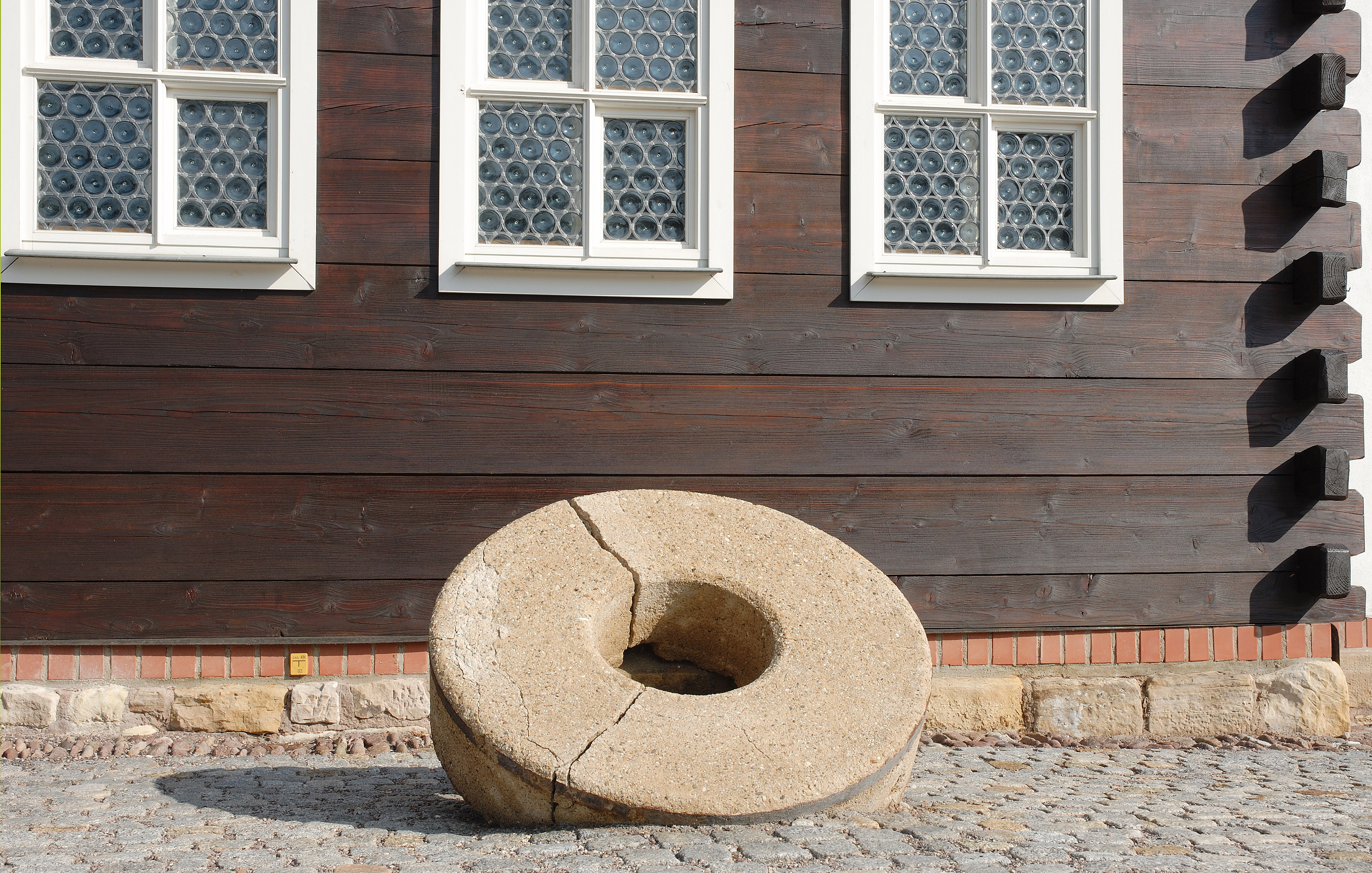 Mühlstein vor der Veit Bach Mühle